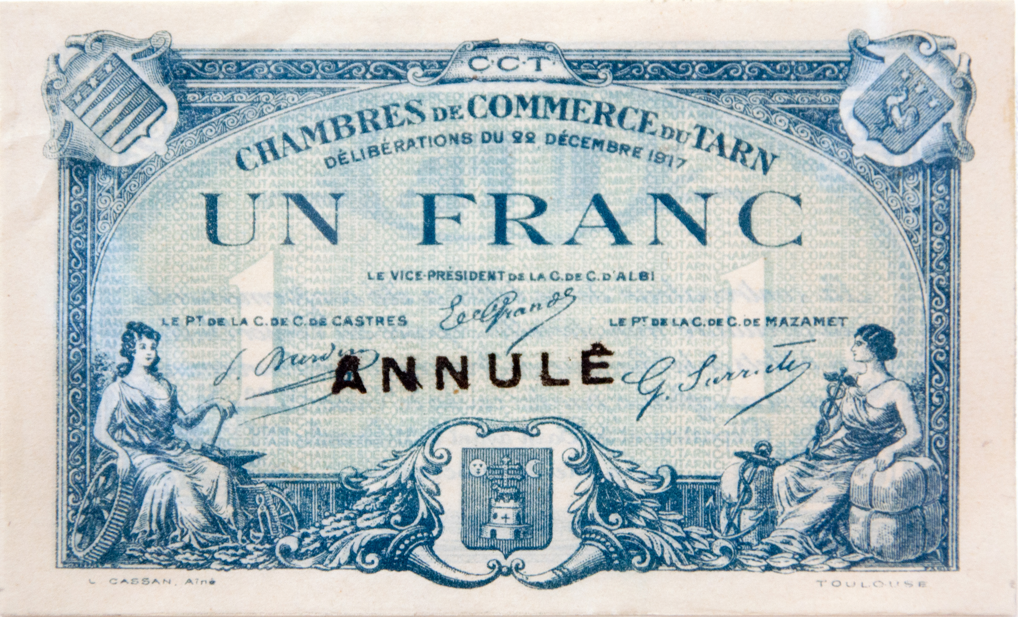 Hôtel de Fumel (Palais Consulaire de Toulouse) JEP 2013 - Billet de nécessité d'un Franc: CCT - Chambres de Commerce du Tarn Délibérations du 22 décembre 1917 Signatures des responsables des Chambres de Commerce d'Albi, de Castres et de Mazamet